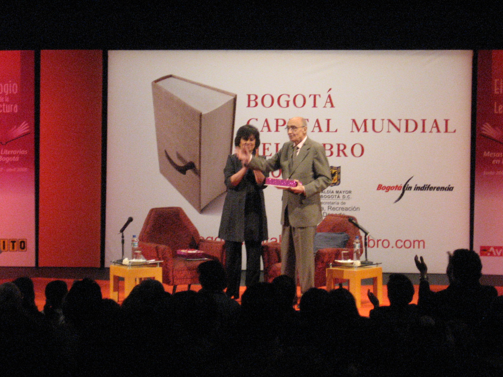 Bogota,Capital Mundial del Libro. teatro Jorge Eliecer Gaitan con Jose Saramago